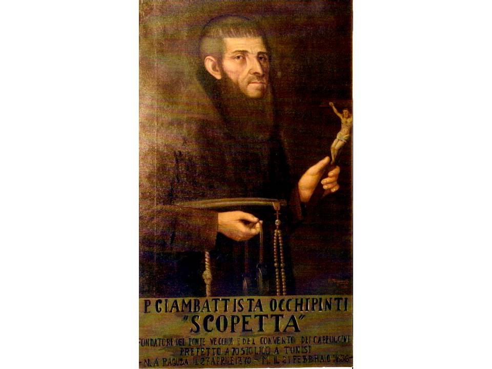 Padre Gianbattista Occhipinti Scopetta